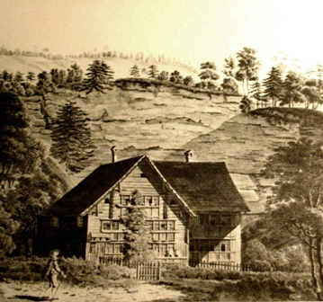 Wohnhaus von Ulrich Bräker, Darstellung ca. 1794 (Wohnhaus Ulrich Bräkers, erbaut 1760/61, abgebrannt 1836)